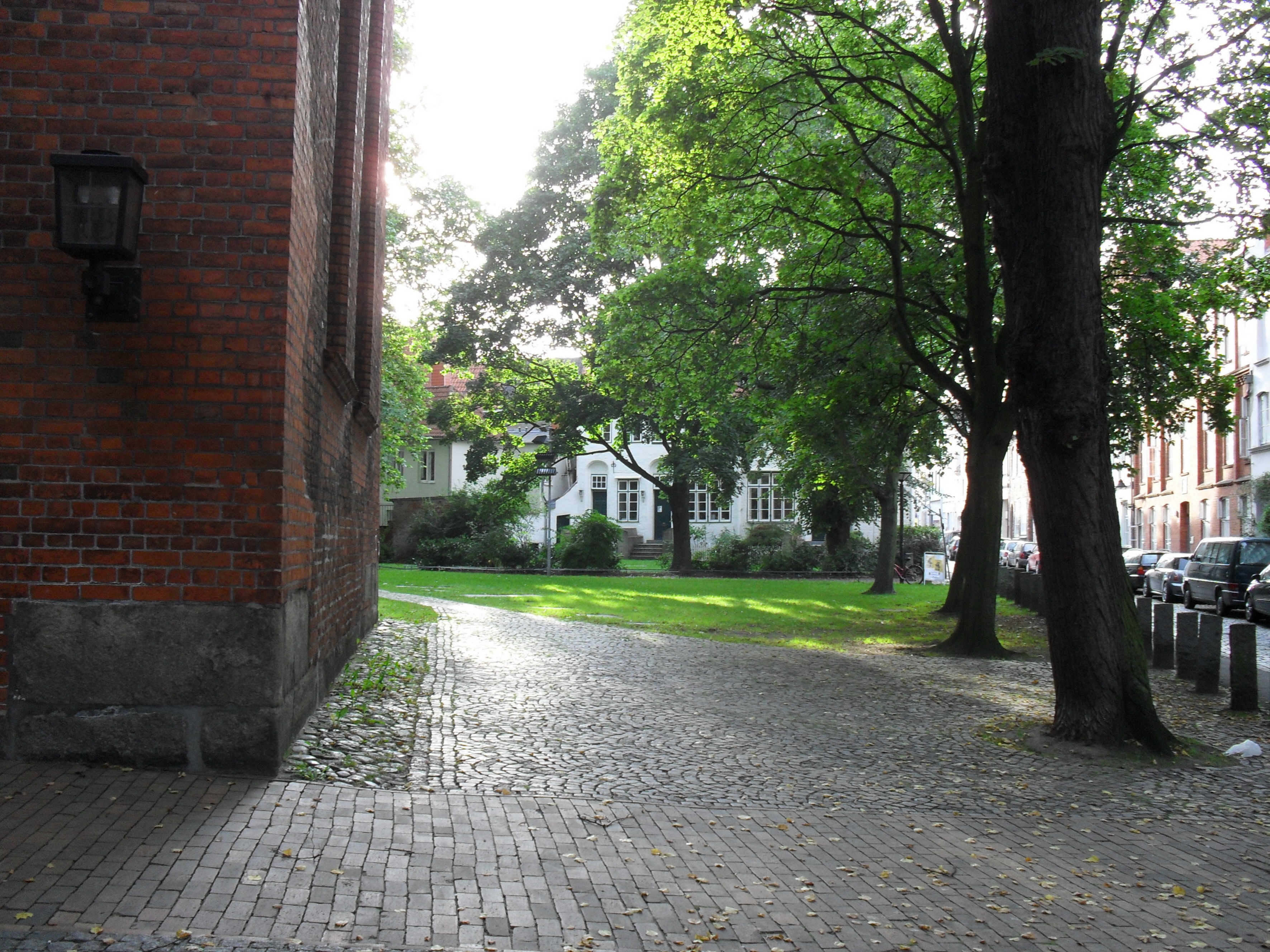 Der Aegidienkirchhof in Lübeck